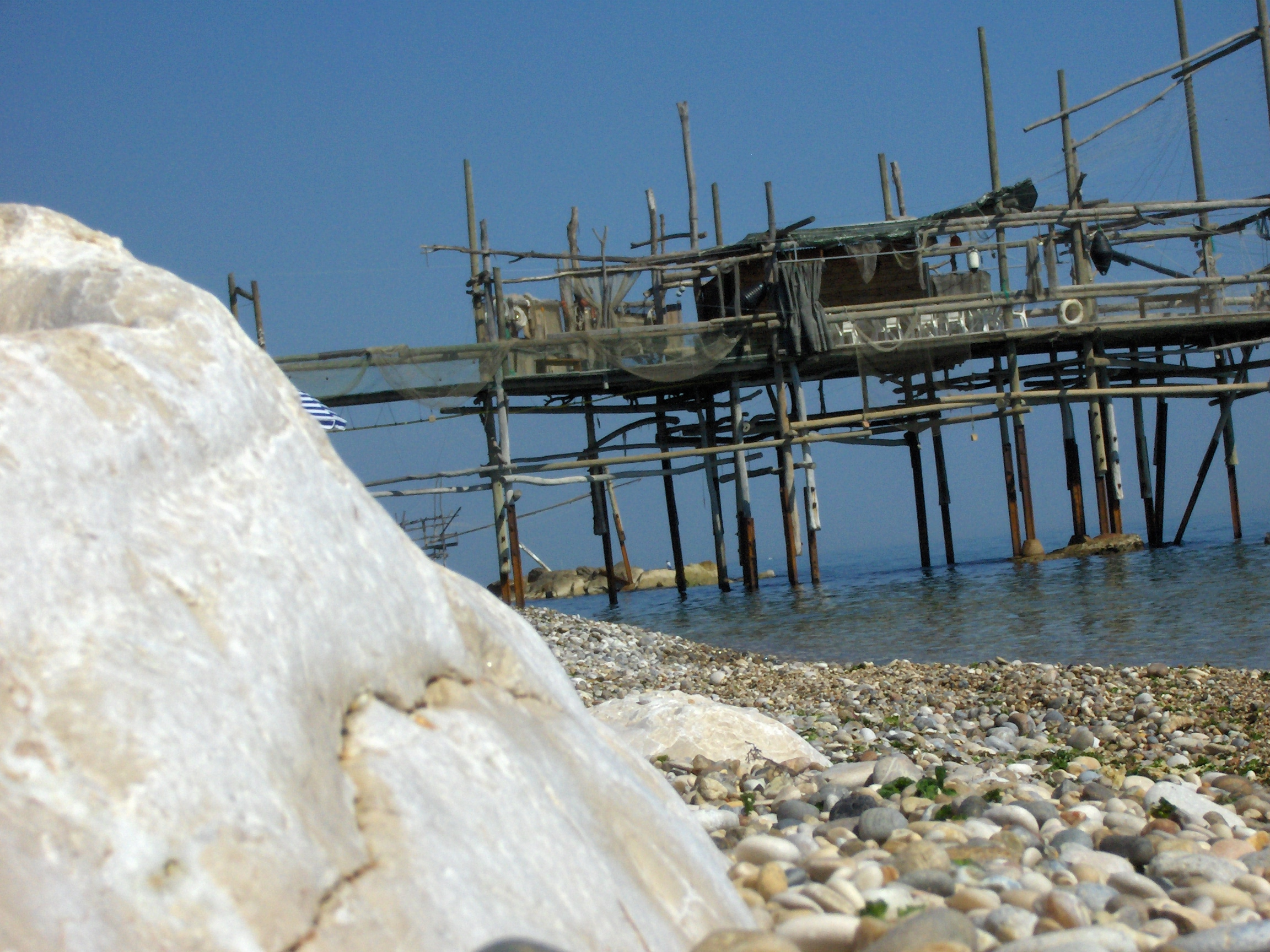 San Vito Chietino: un trabocco presente su una spiaggia vicina al porto.